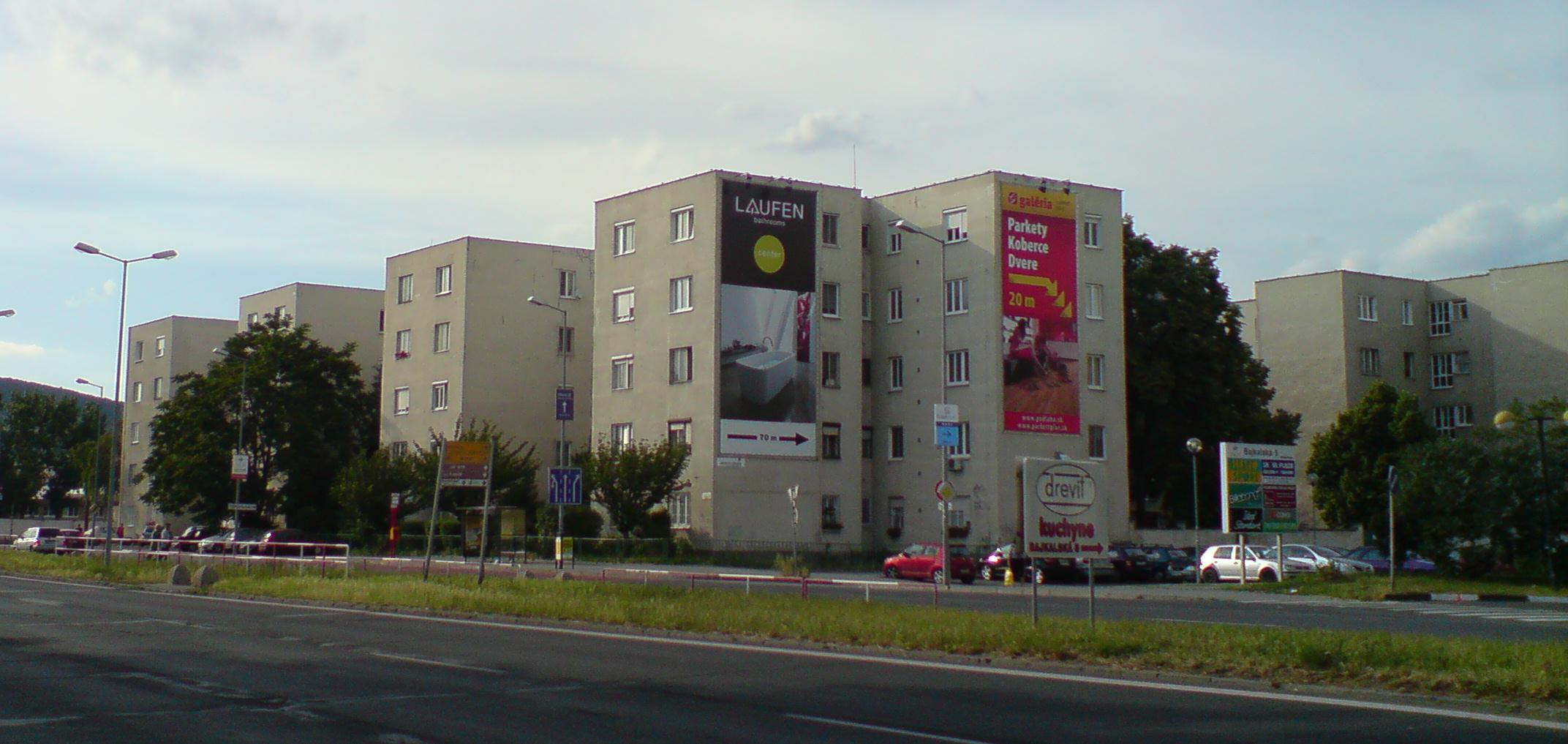 Nová doba Estate at Bajkalská Street, Bratislava